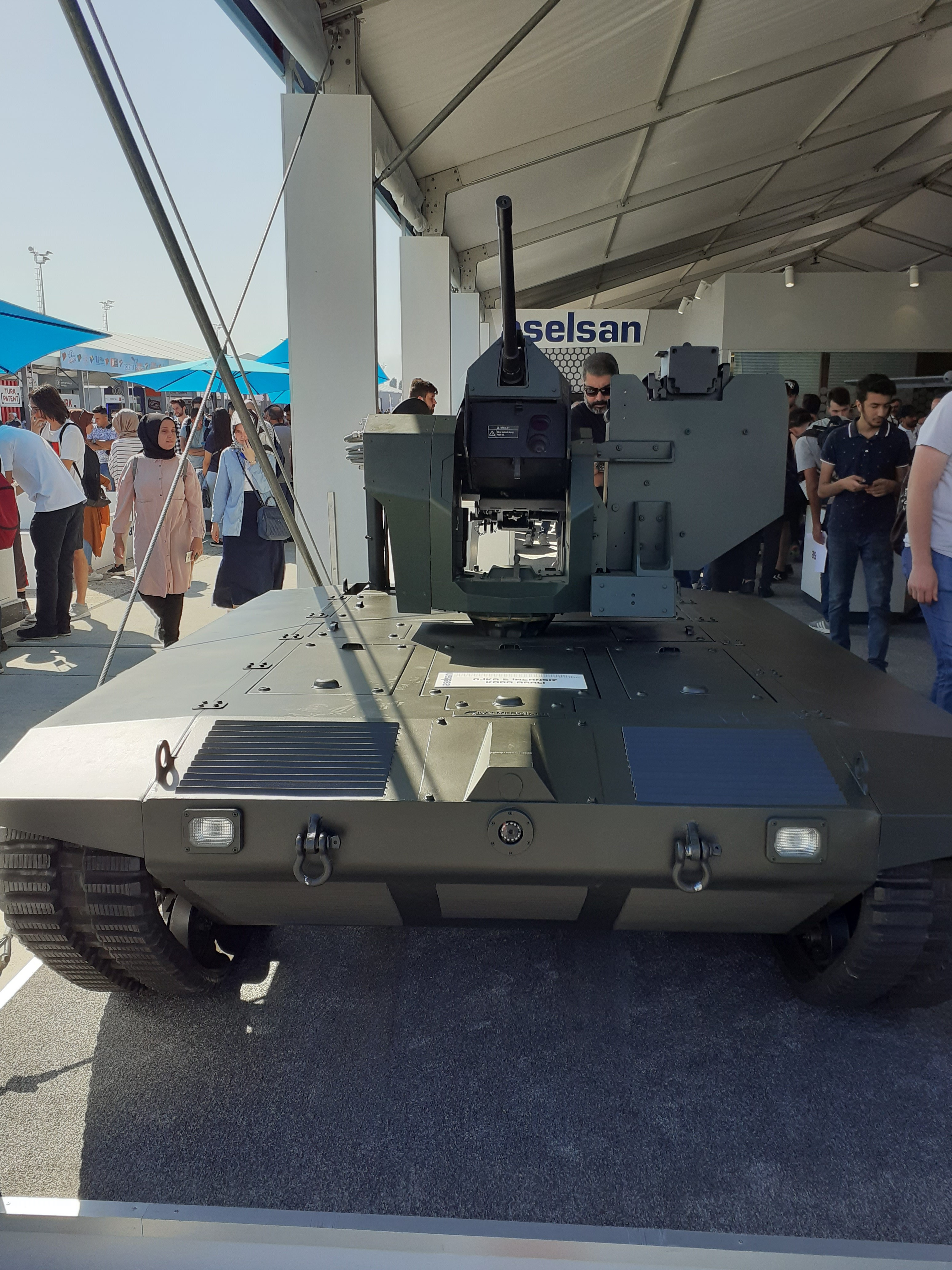 ASELSAN 0-İKA 2 İnsansız Kara Aracı, Teknofest 2019